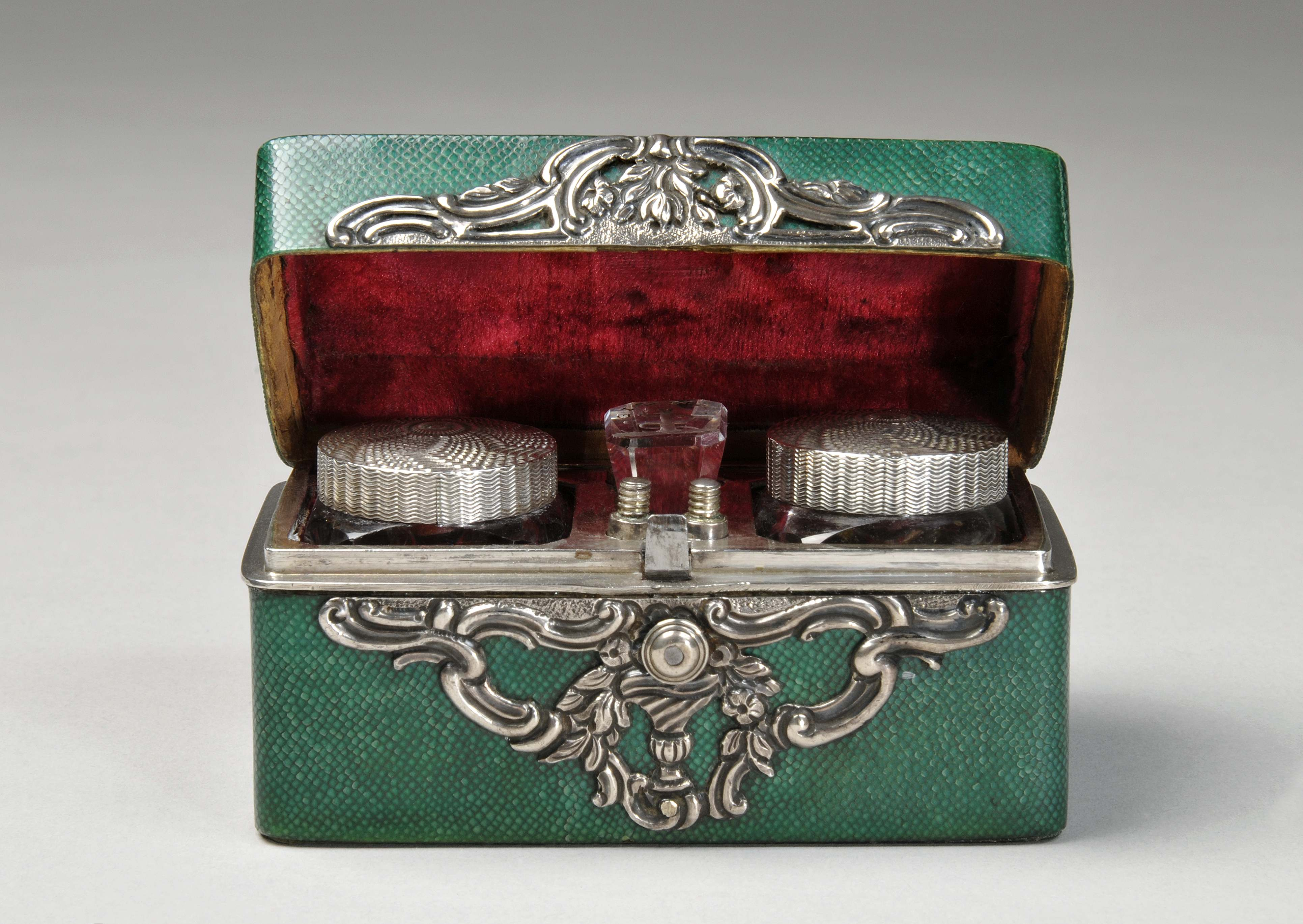 Objekt aus dem DLM: Reiseschreibzeug eines Arztes, London, um 1825. Bezogen mit Seidenhaifischhaut.